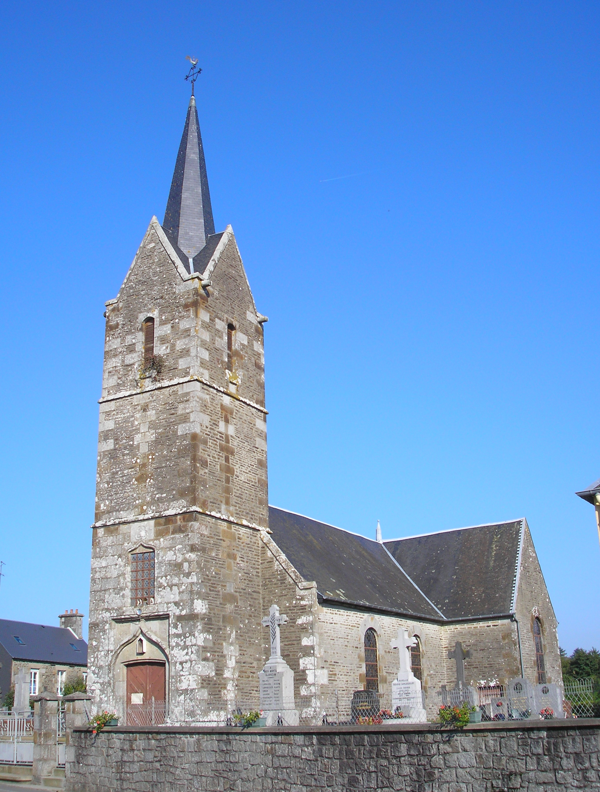 Chèvreville (Normandie, France). L'église Notre-Dame.